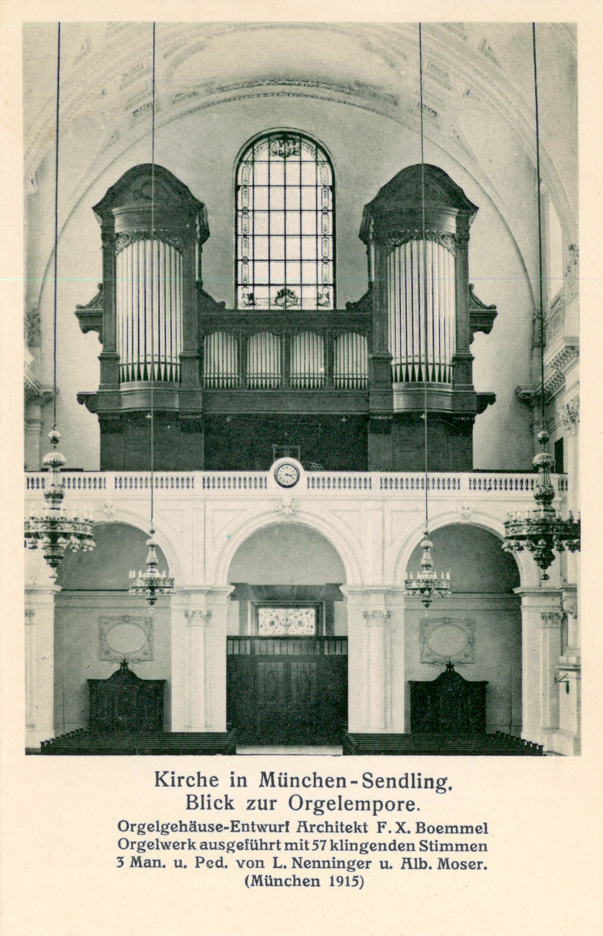 Ansichtskarte der ersten Orgel von St. Margaret aus dem Pfarrarchiv